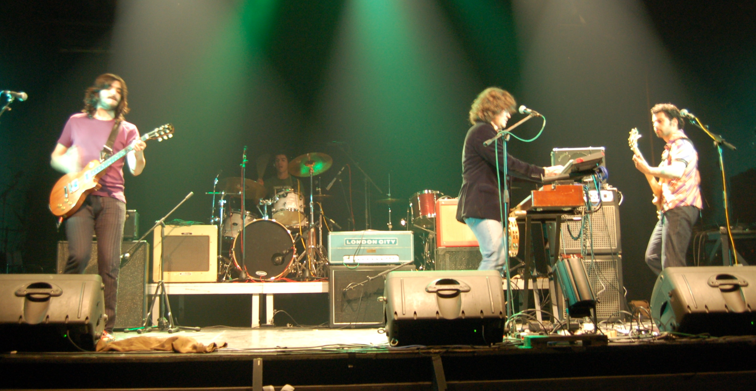 Concerto de Moon Cresta na sala Nasa de Santiago de Compostela